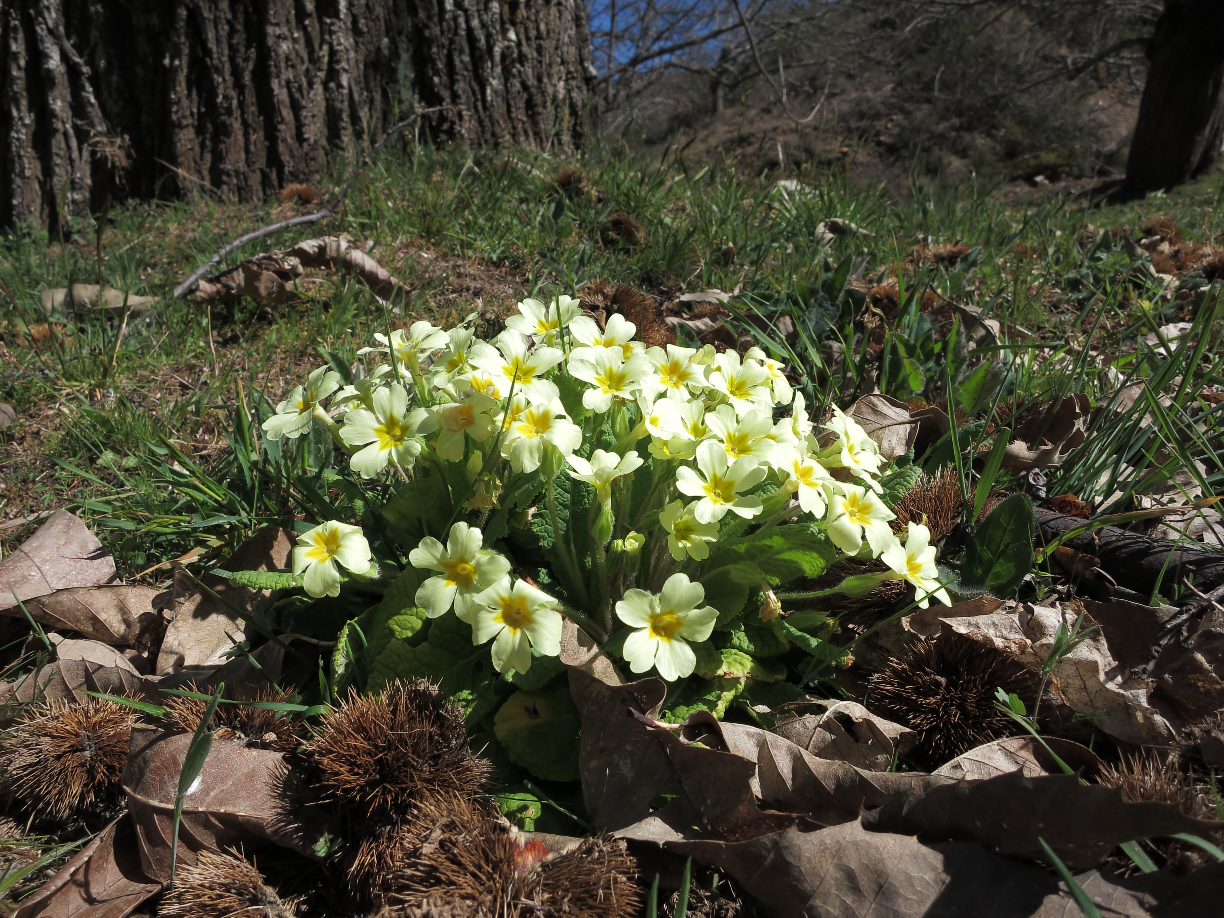 Primula Vulgaris en Las Médulas, Bierzo, León, España